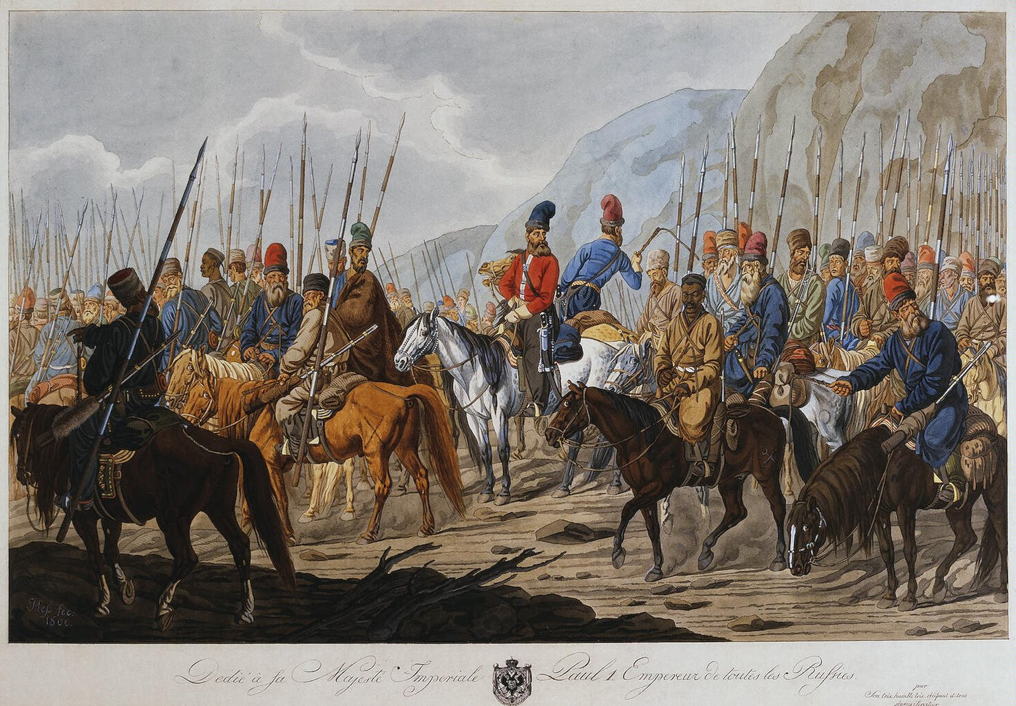 "Уральские казаки на марше" (или "Яицкие казаки в походе"). Картина неизвестного художника. (Возможно, автор австр.офицер Андраш Петрич (Petricch Andras 1765–1842 гг.). С картины позже сняли акварельную копию. На выставке, посвященной 250-тилетию М. И. Кутузова, проводившейся в художественной галерее Музея Победы (ВОВ) на Поклонной Горе, где экспонировался оригинал этой акварели из фондов ГИМа, авторство ее было приписано П. Хессу. Источник)